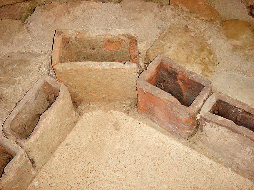 Conduits d'air chaud et de fumée dans des thermes romains.